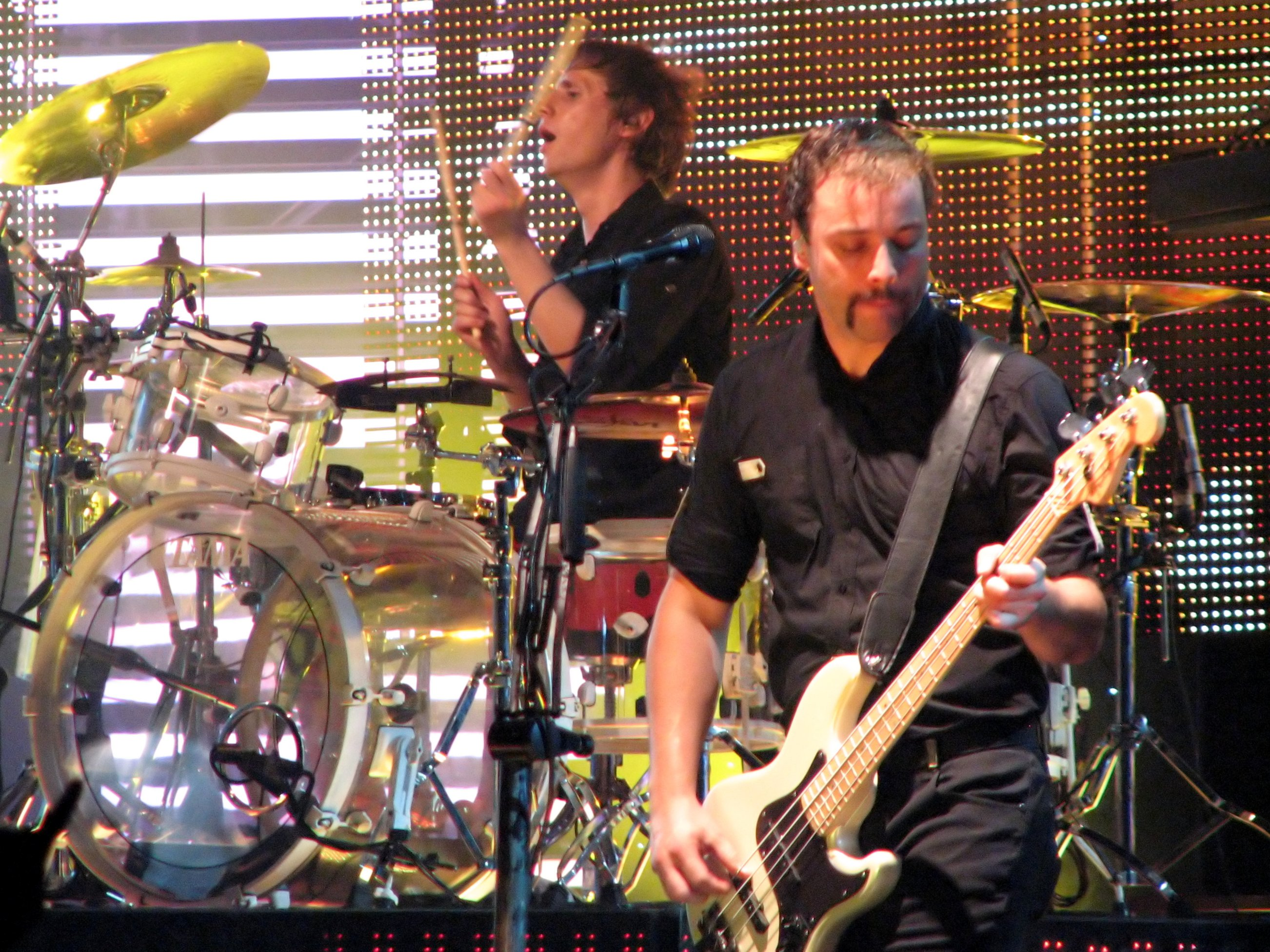 Bellamy.